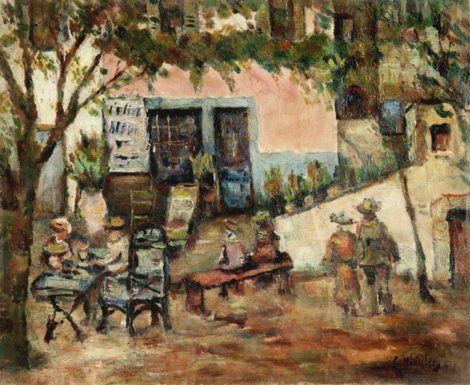 Tableau L’Olive bleue à Saint-Paul-de-Vence, de Léon Weissberg